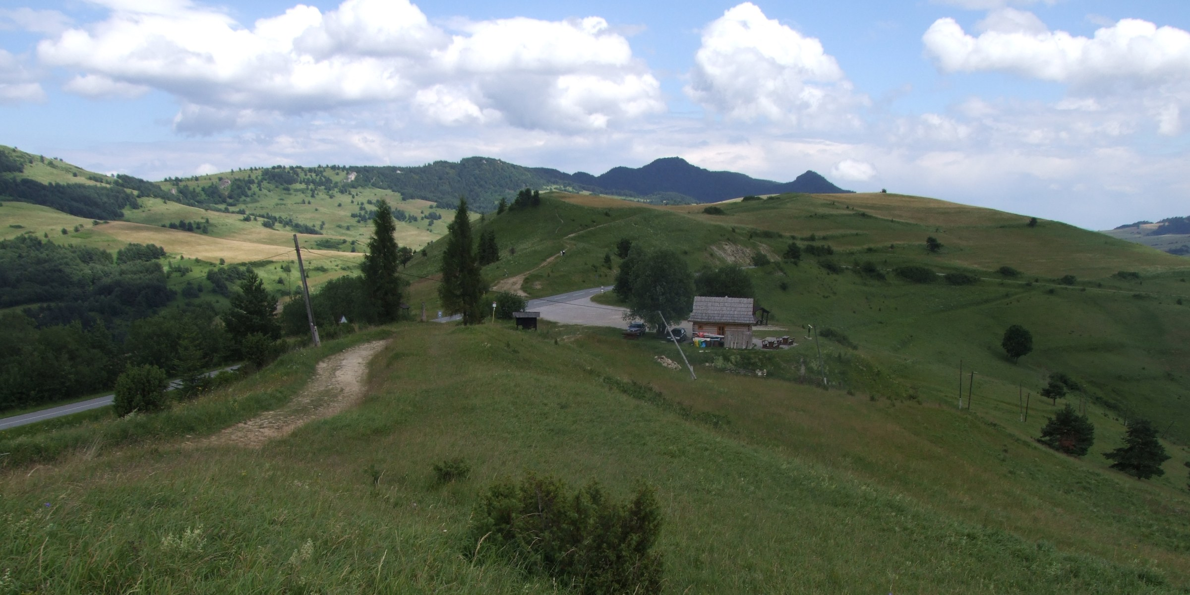 Przełęcz Tokarnia (Grupa Golicy, Pieniny)